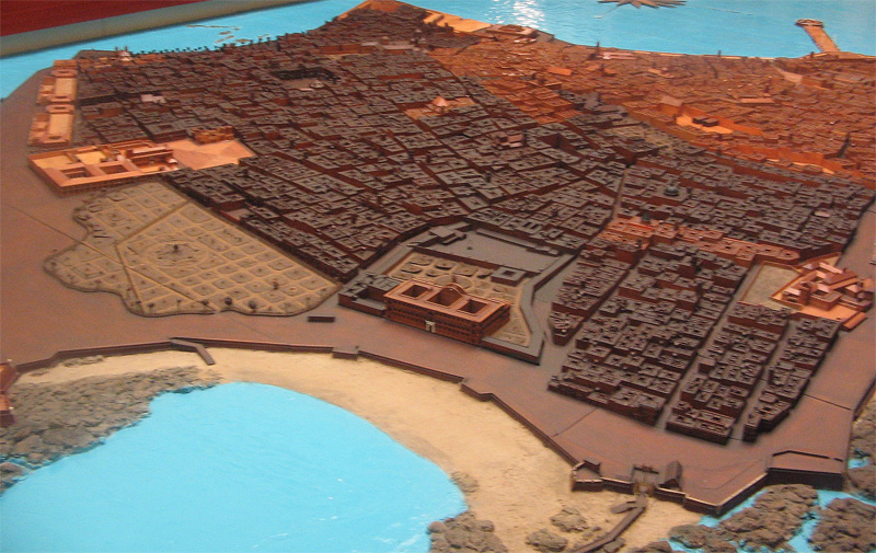 Vista parcial de la maqueta de Cádiz de 1777 ubicada en el Museo de las Cortes de Cádiz.